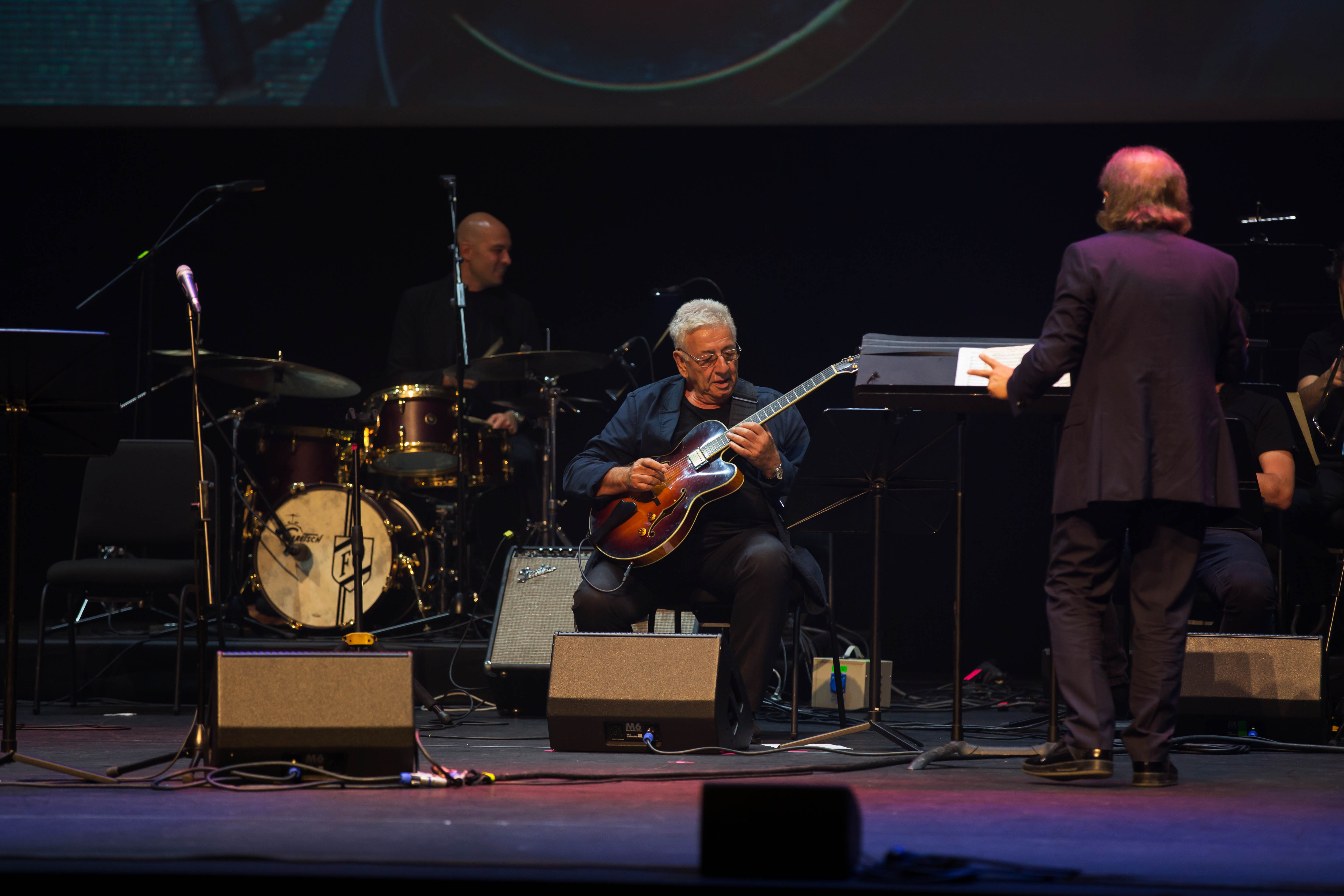 Caz müzisyeni